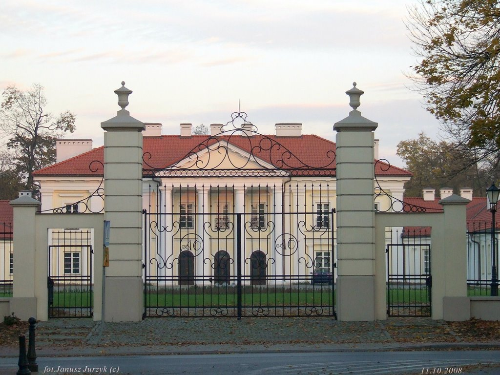 Pałac Ogińskich w Siedlcach.